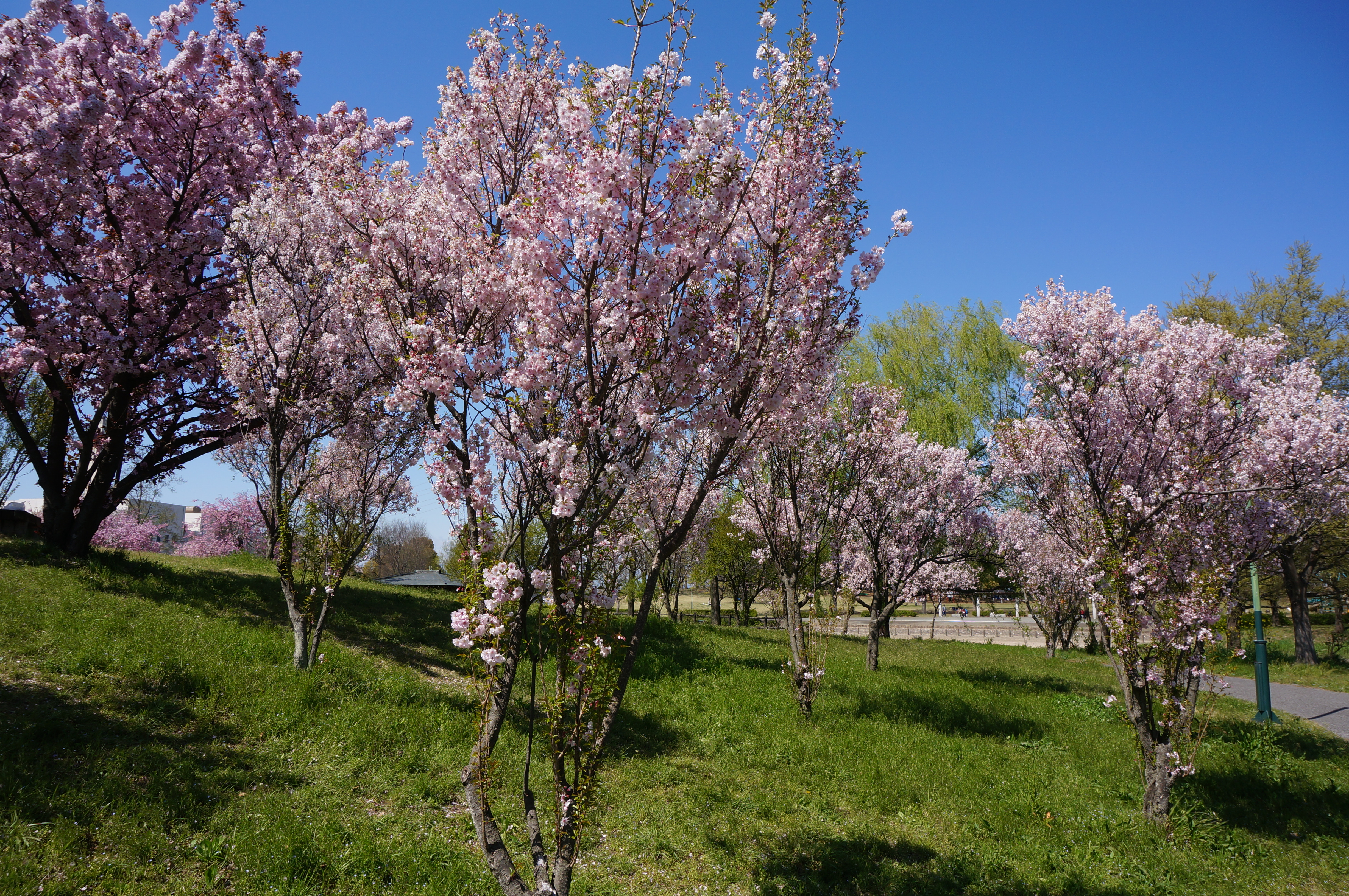 埼玉県熊谷市別府沼公園のクマガイ